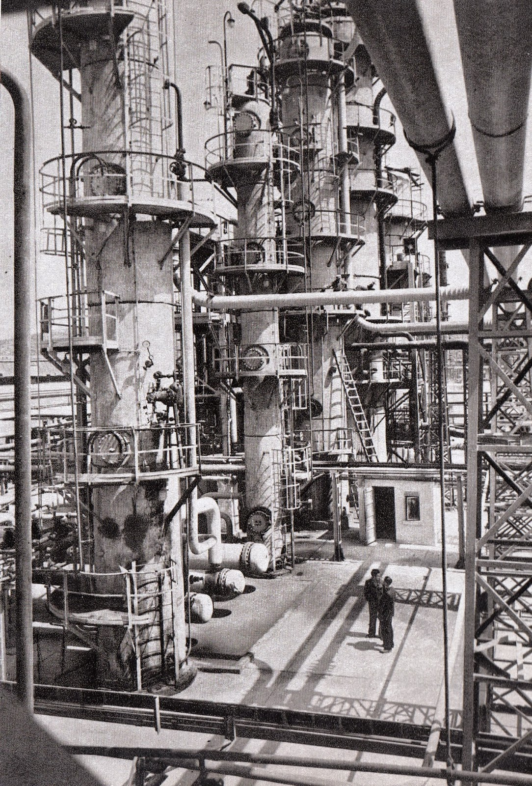 Album: Mica geografie a Republicii Populare Romîne (1963).